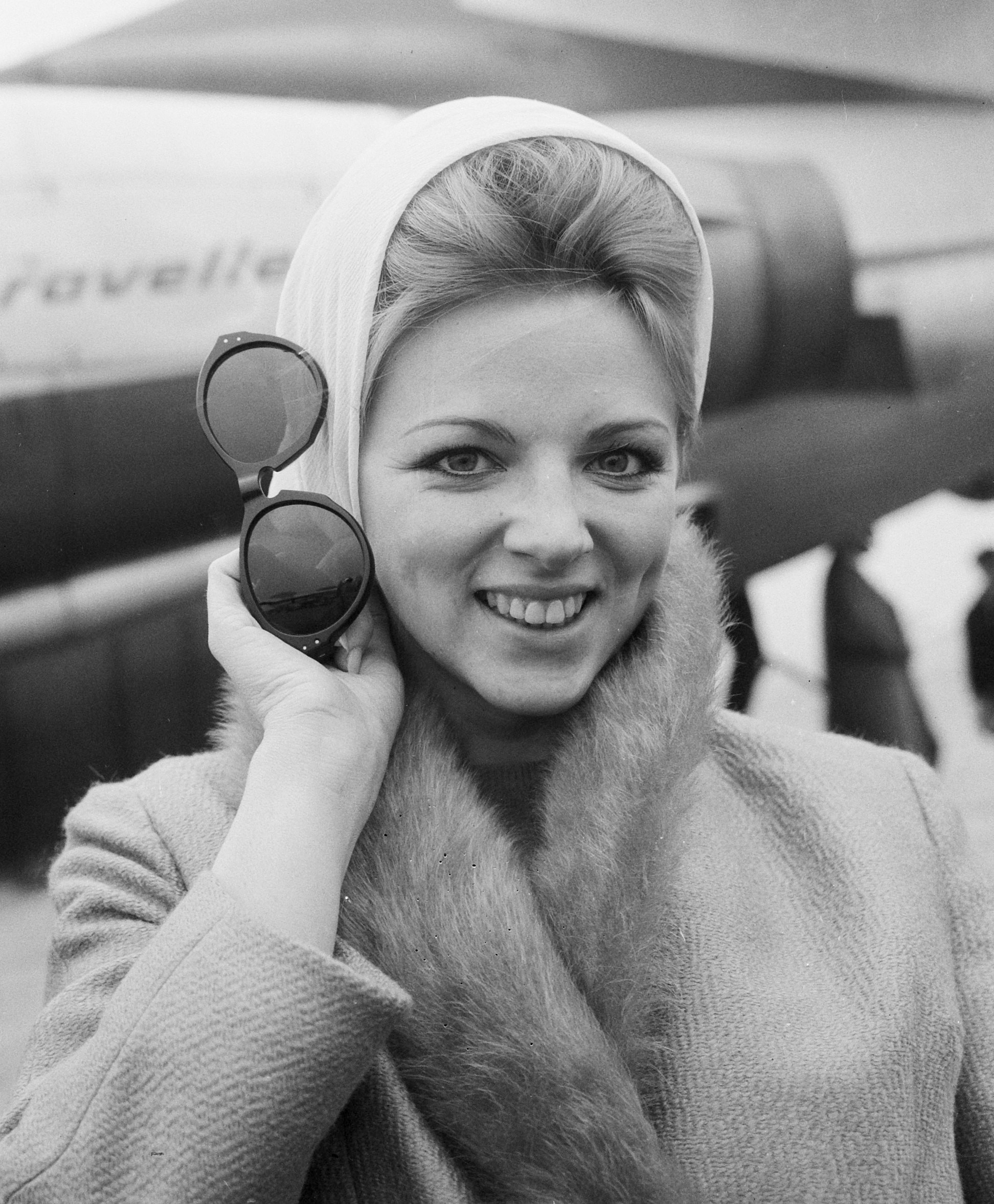 Filmactrice Thea Flemming, de Hollandse Brigitte Bardot, bij aankomst op Schiphol